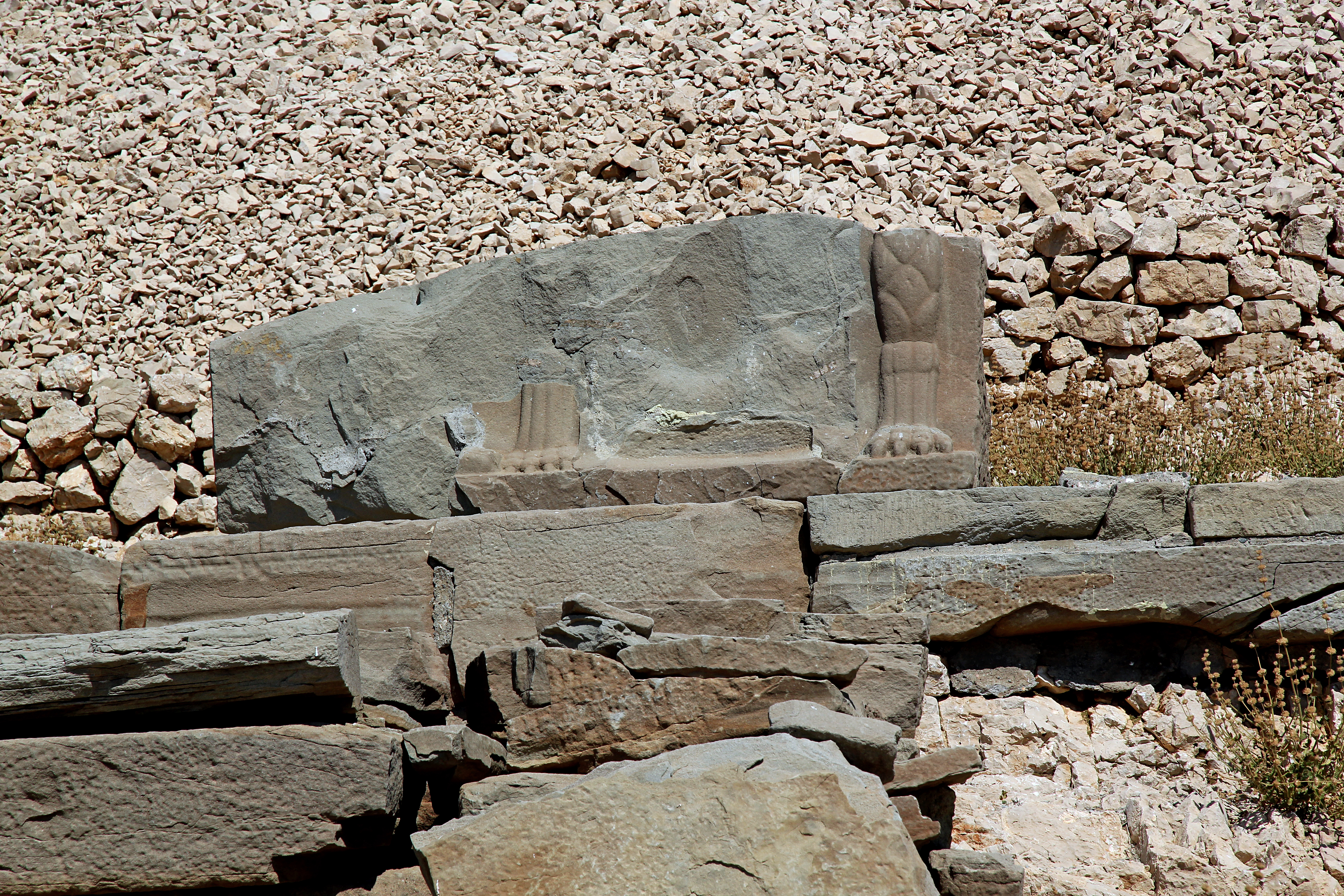 Sockelfragment der Zeusdexiosis, Nemrut Dağı, Südosttürkei, Westterrasse